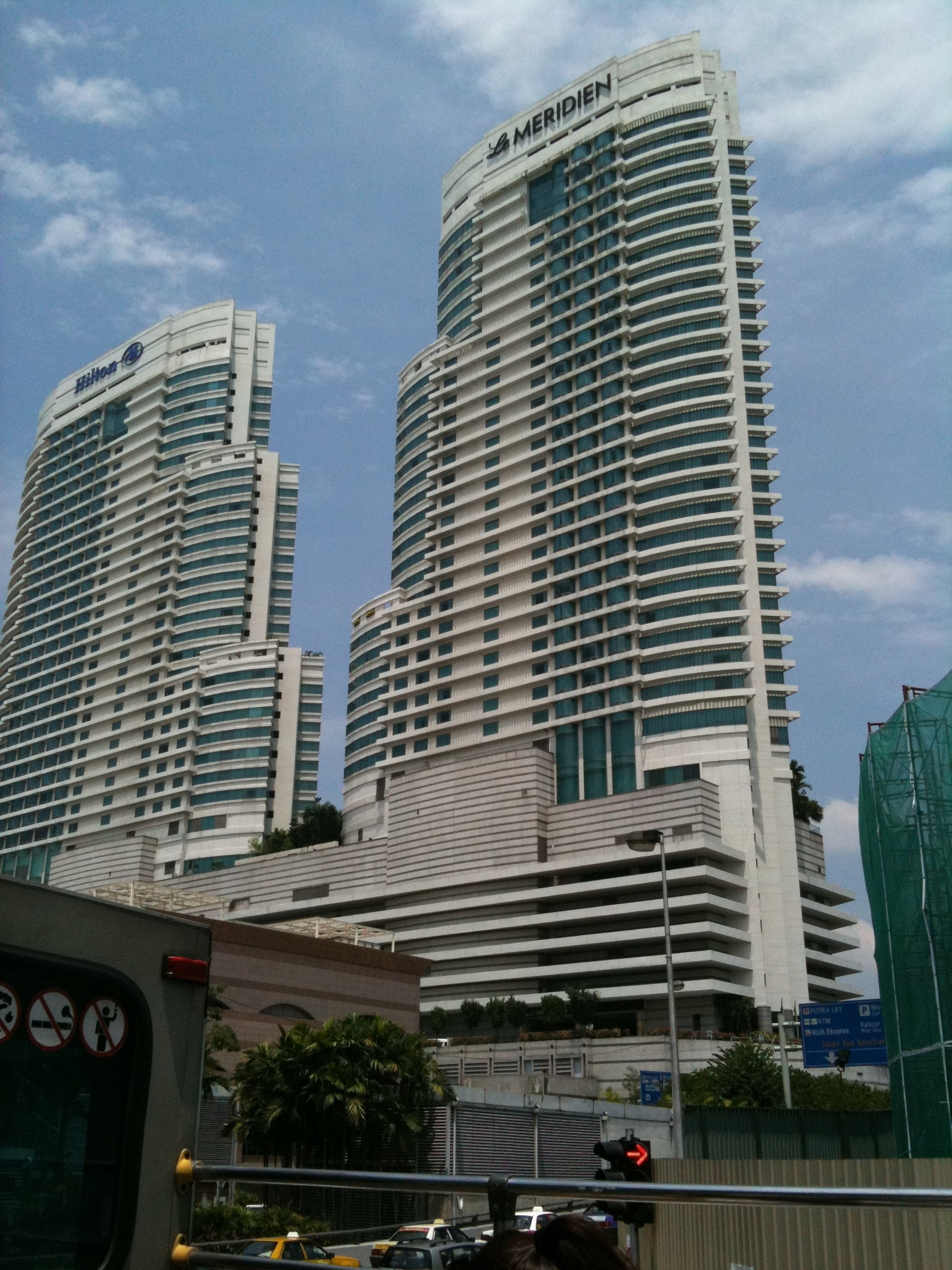 Kuala Lumpur